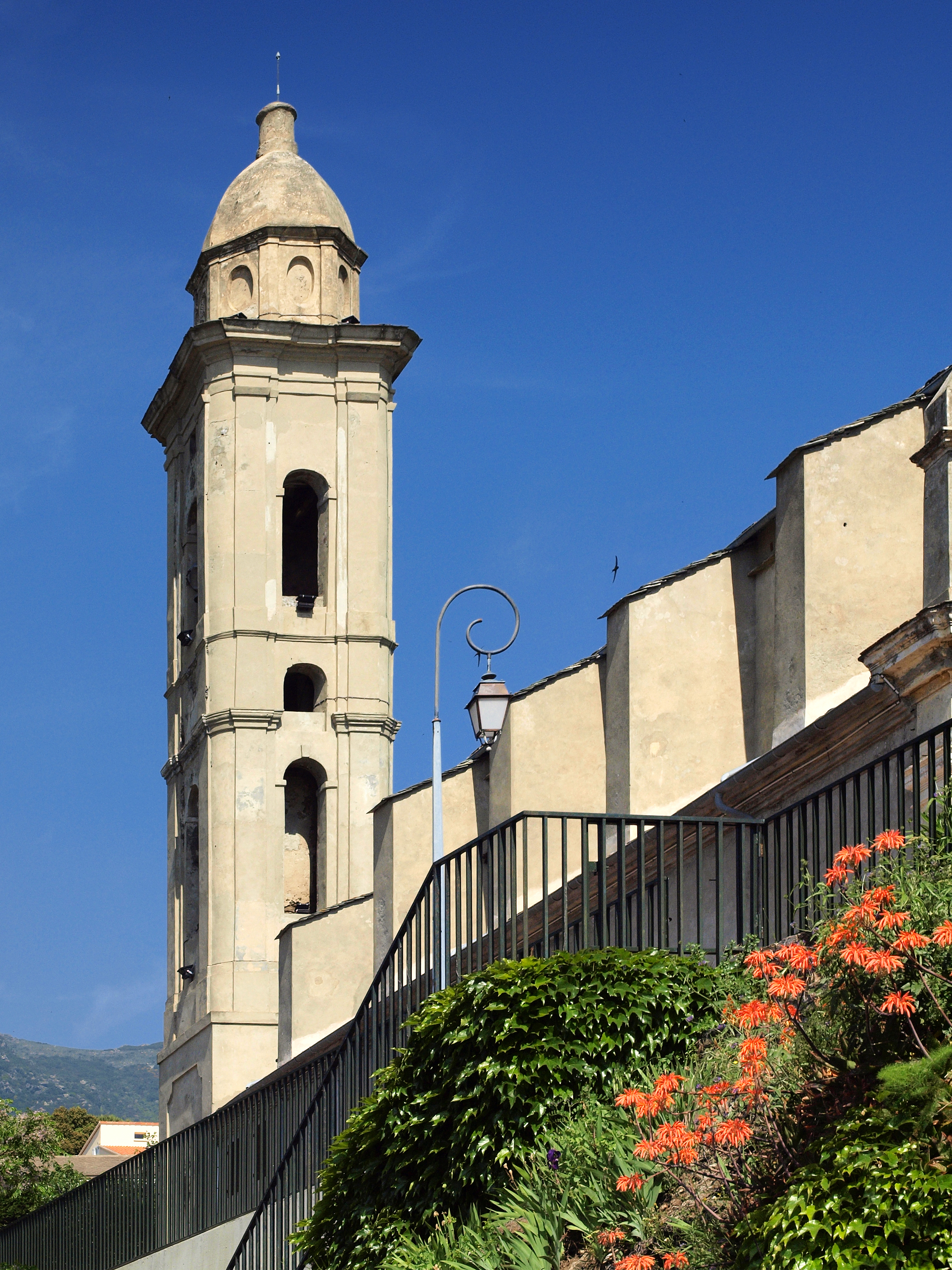 Ville-di-Pietrabugno (Corsica) - Clocher de l'église Santa Lucia